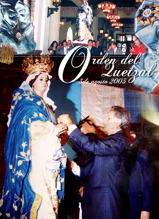 Virgen de los Reyes al momento de recibir la Orden del Quetzal